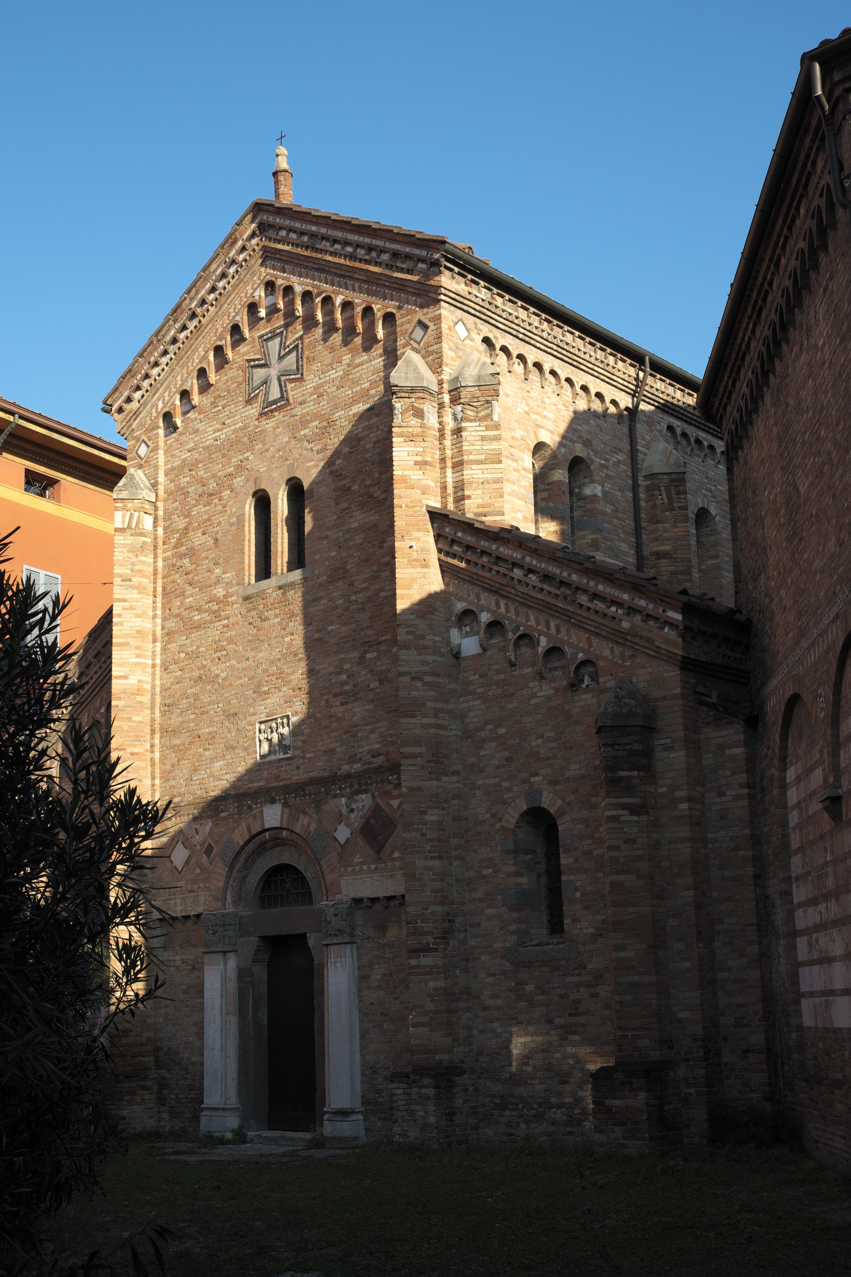 Kirche Santi Vitale e Agricola (der Heiligen Vitalis und Agricola) der Kirchenfamilie der Basilika Santo Stefano in Bologna (Emilia-Romagna/Italien)